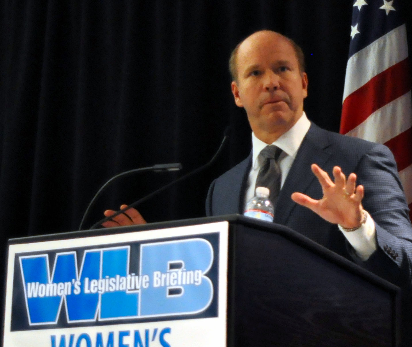 wlb 0713 OC Delaney